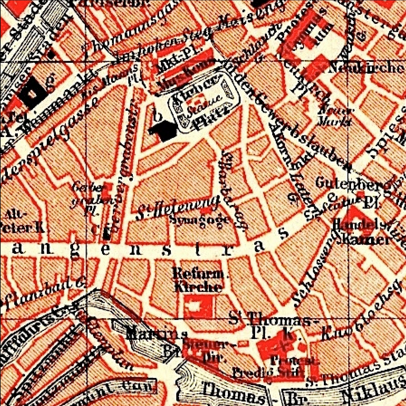 Carte Strasbourg extrait Meyers Konversationslexikon 1888